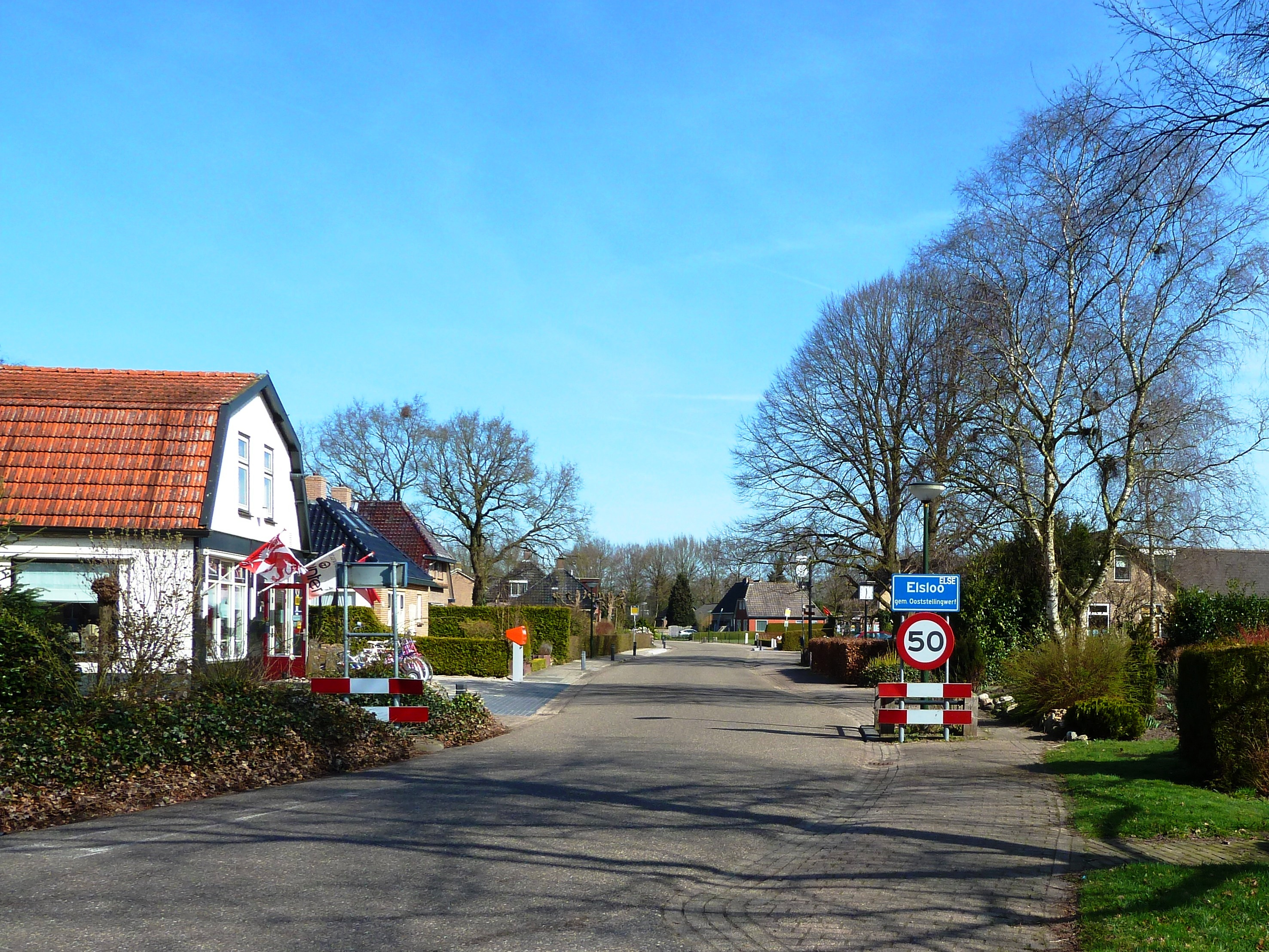 Elsloo, naambordje met de Stellingwerfse naam 'Else' rechtsboven.